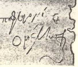 Parte finale della firma del dux Argyros, figlio di Mele da Bari